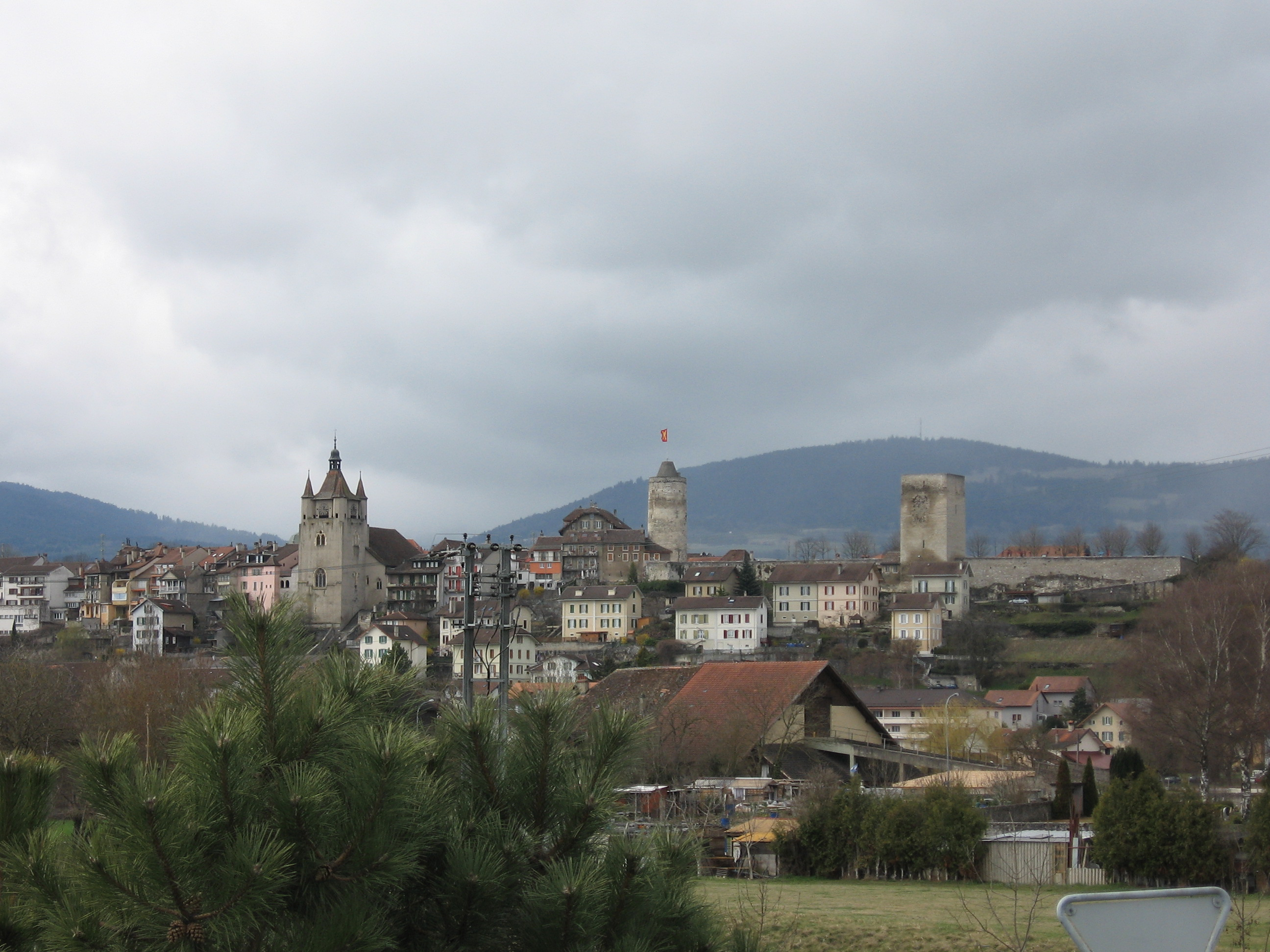 Orbe (VD), Switzerland, Suisse, Schweiz